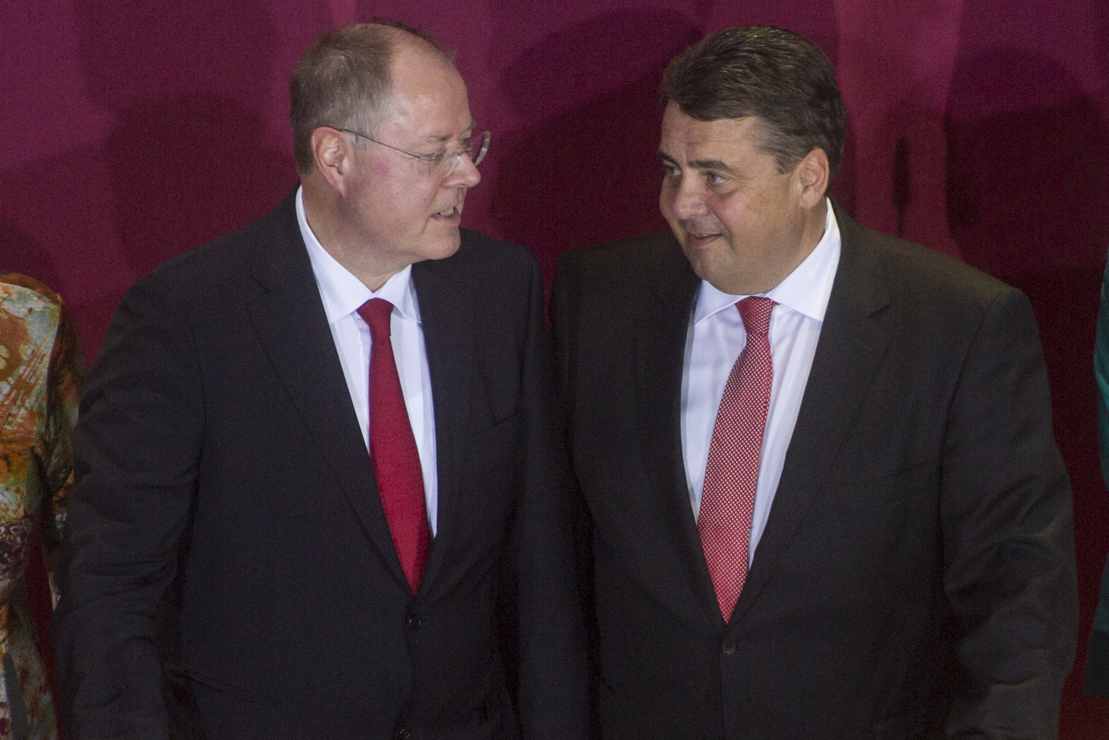 Wahlparty der Bundes-SPD im Willy-Brandt-Haus zur Bundestagswahl 2013.